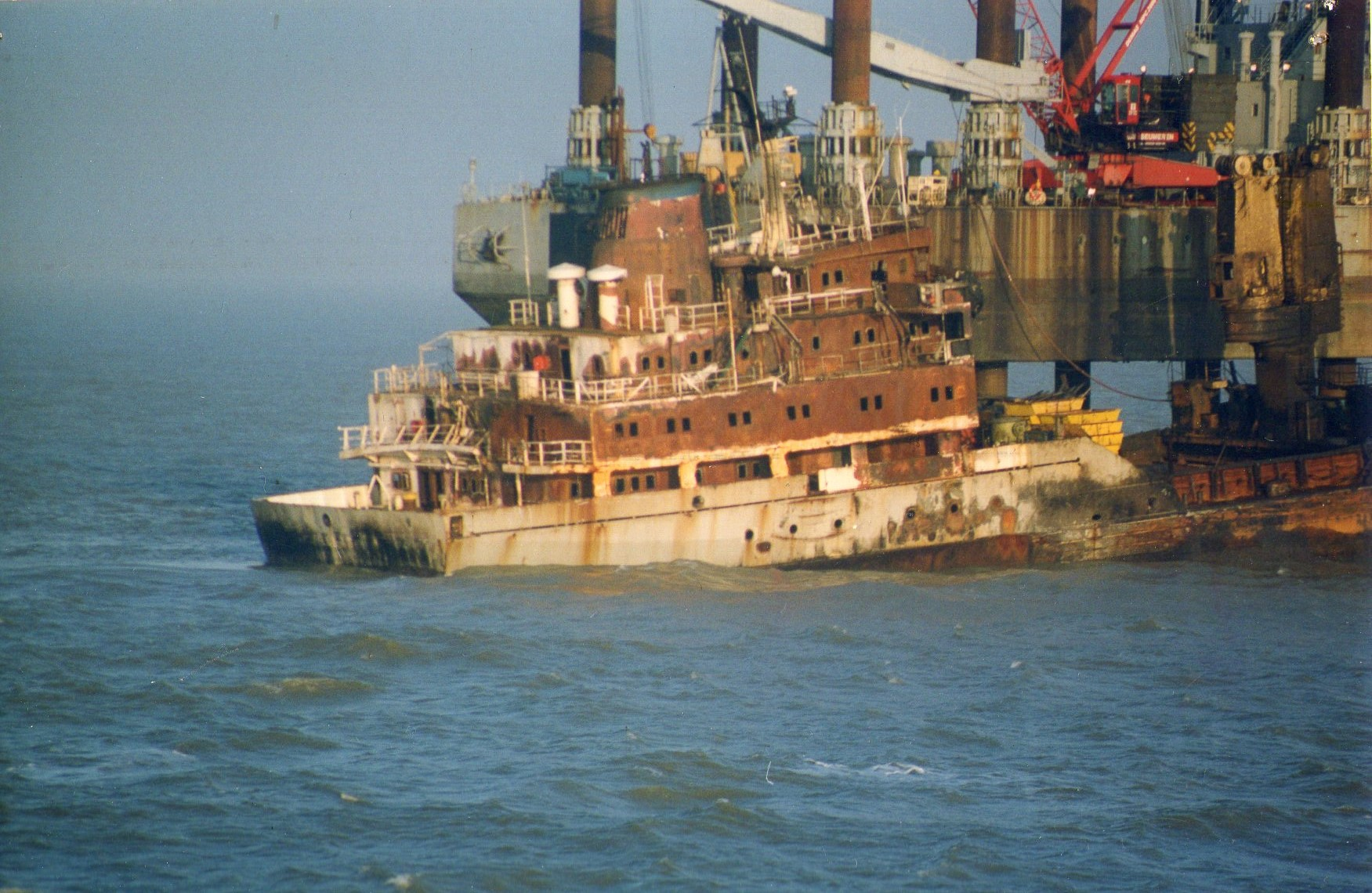 Pallas-Wrack im Jahr 1999